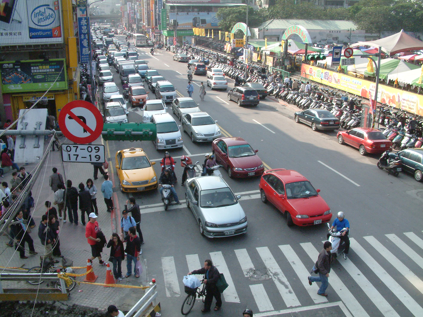 台北希望廣場，位於臺北市中正區八德路一段49號。拍攝於光華橋。